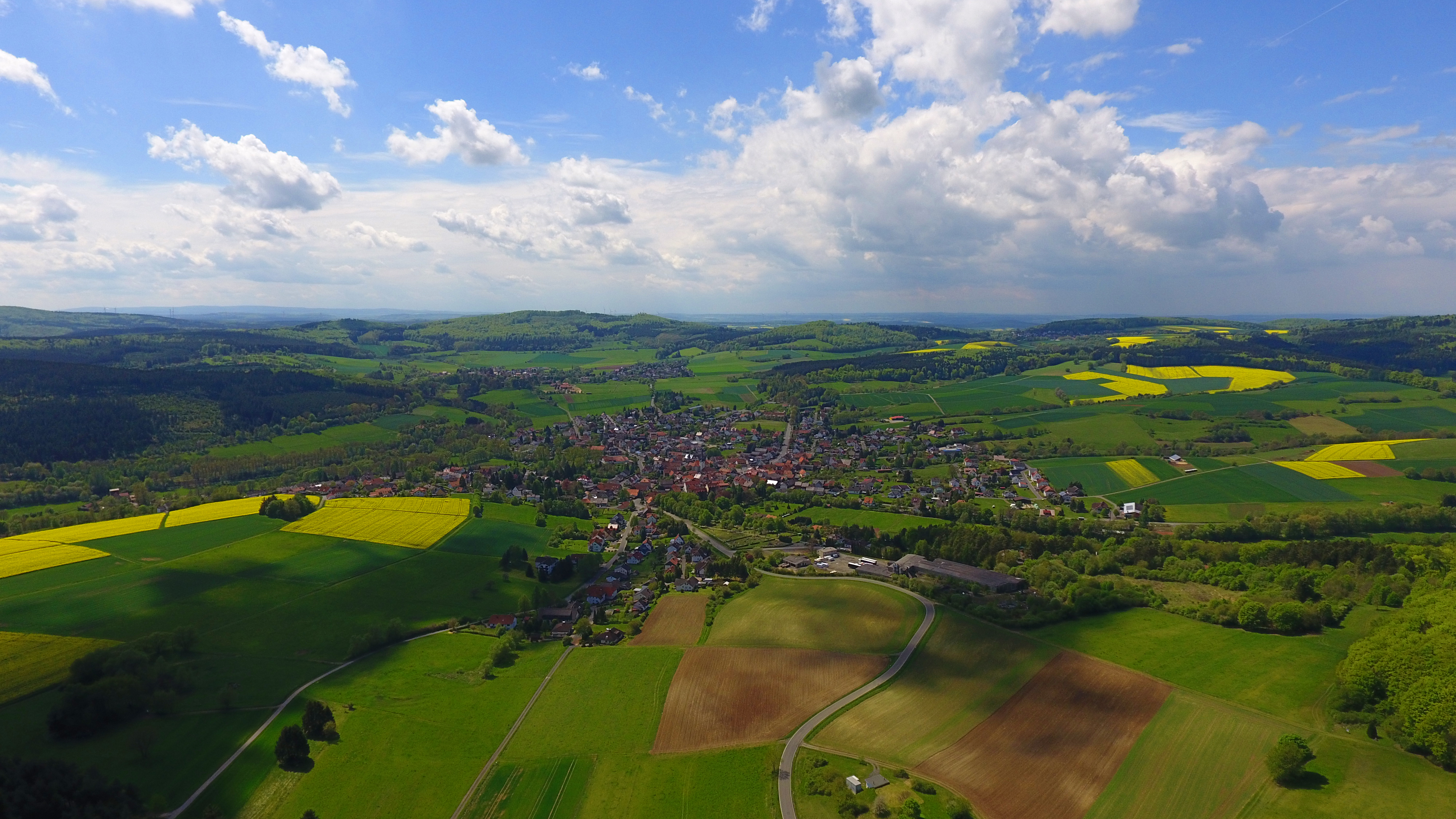 ein Service von